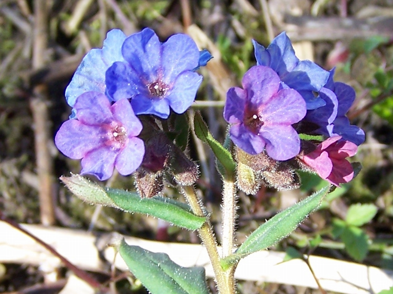 Pulmonaria obscura (pl. miodunka ćma)